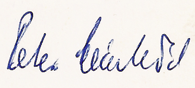 Peter Meinhold. Signatur 23. 5. 1977 seiner handschriftlichen Widmung des mir gegebenen Sonderdrucks seiner Untersuchung der »Entwicklung der Religionswissenschaft im Mittelalter und zur Reformationszeit«.